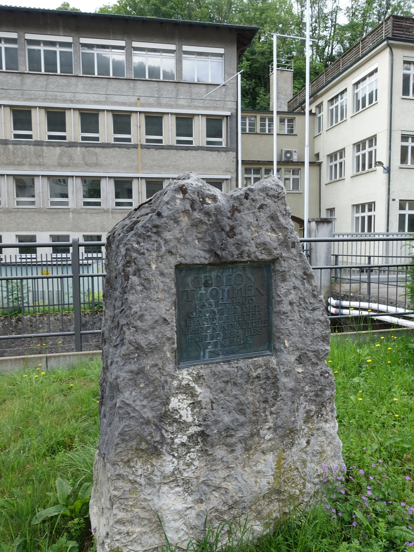 Gedenkstein für Gédéon Thommen (1831–1880) Unternehmer und Politiker in Waldenburg